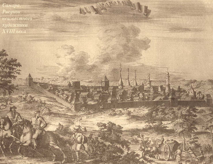 Самара. Рисунок неизвестного художника XVIII века